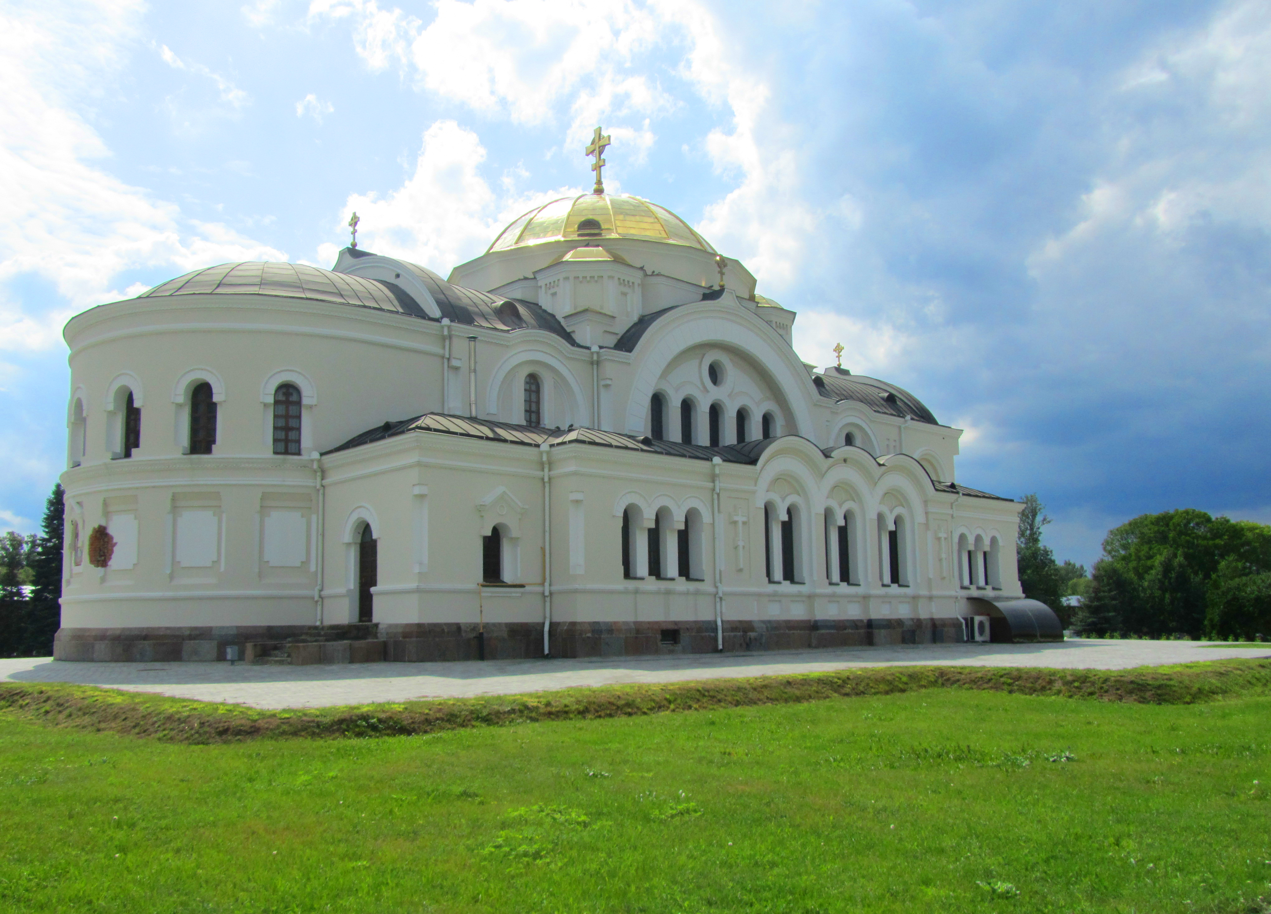 Мікалаеўская царква. г. Берасьце This is a photo of Belarusian heritage monument. Reference number: 113Г000005 ( WLM)